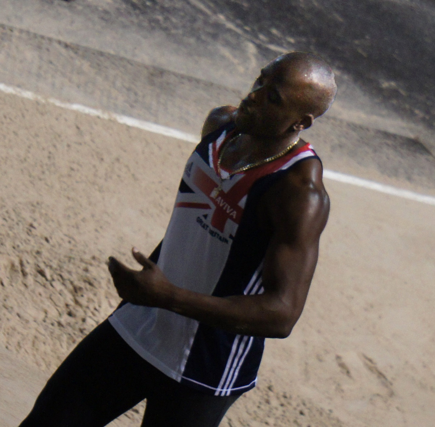 Le sauteur en longueur britannique J.J. Jegede lors des rencontres d'athlétisme de Reims 2013.